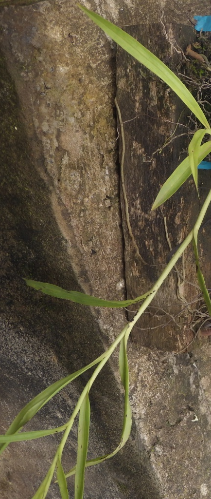 Feuilles étroites et acuminées, espacées, engainantes, oblongues.